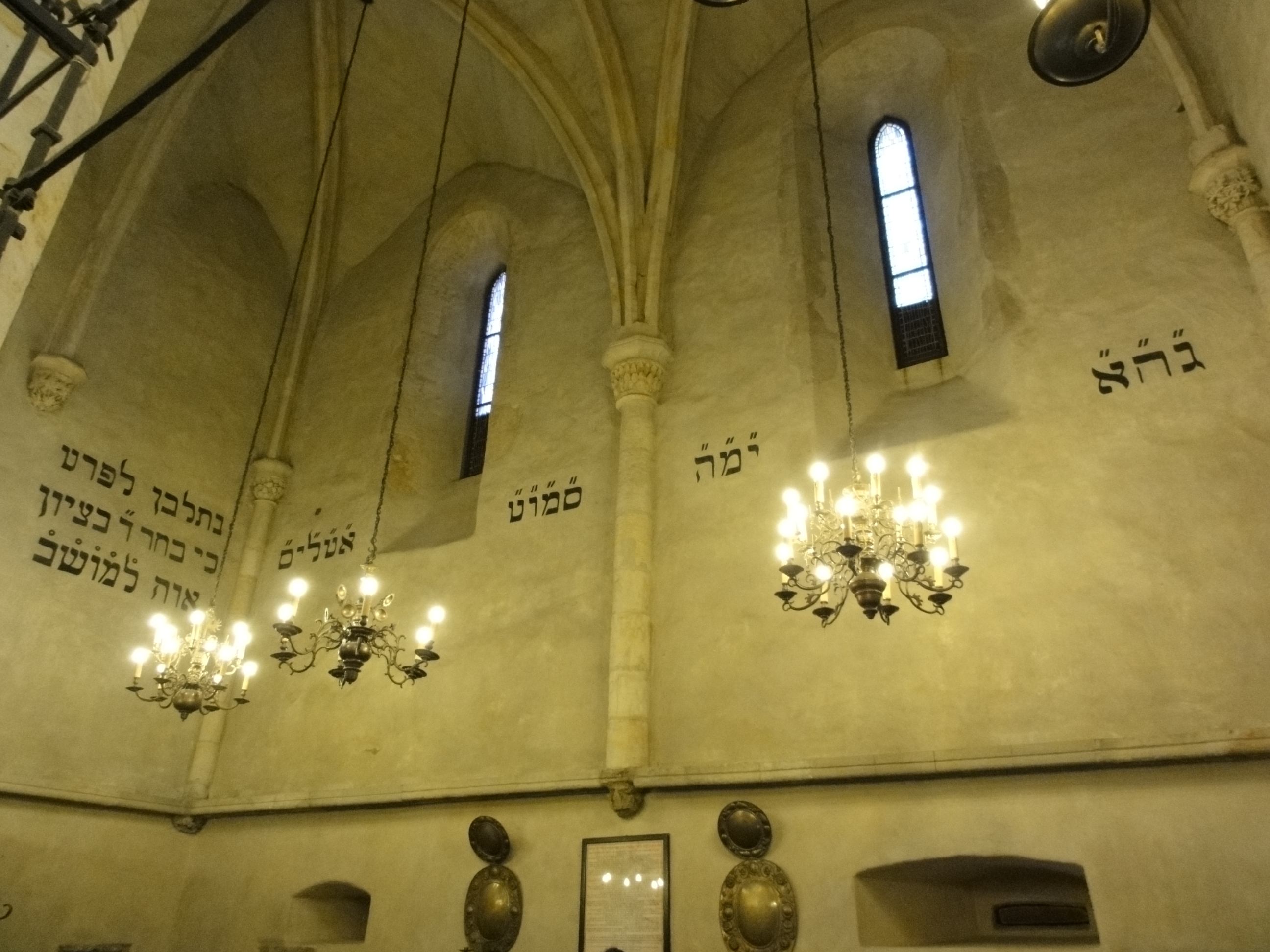 גדול העונה אמן יותר מן המברך סור מרע ועשה טוב אך טוב לישראל סלה